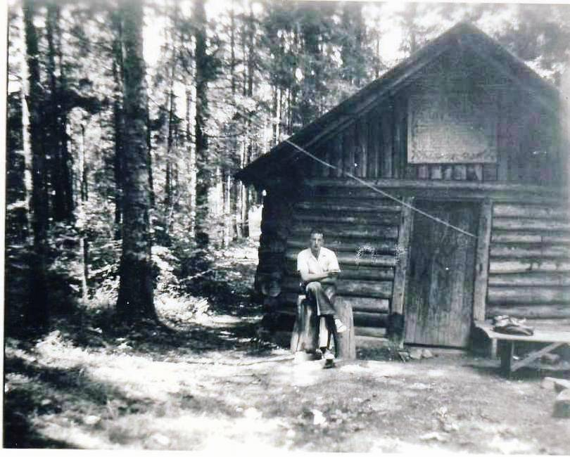 Lièpvre.JPG